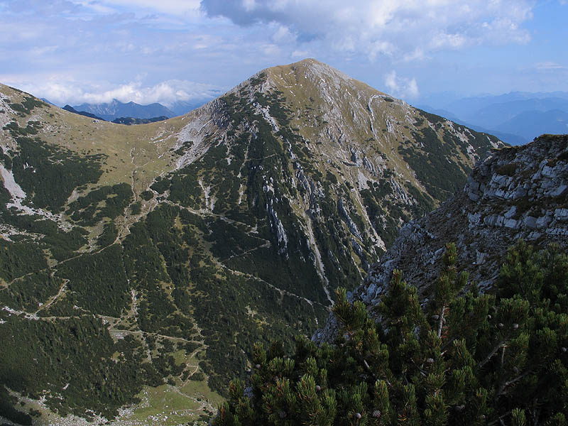 Der Krottenkopf im Estergebirge * selbst fotografiert (Oktober 2004) * Lizenz: GNU-FDL